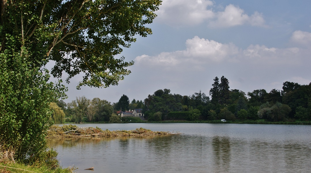 Le Lac